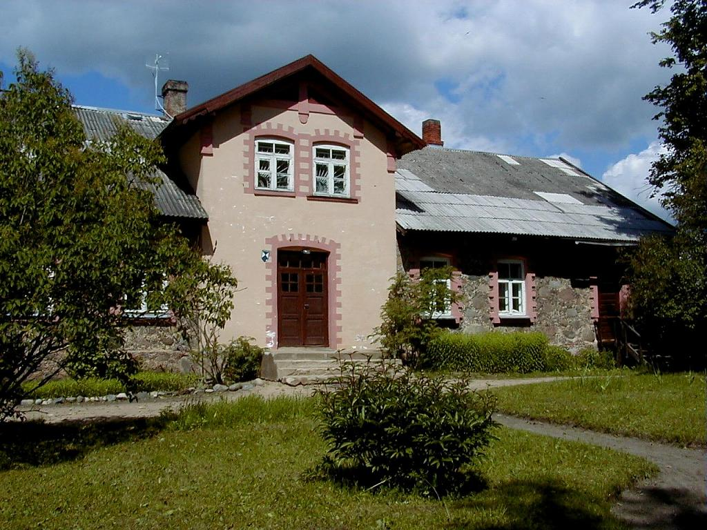 Blomes (Ozolkalna) muiža 2001-06-16